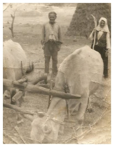 Kandıra'nın Veyisler köyünde Manav çift, Manav kadın Şarışeyh köyünden Mühriye